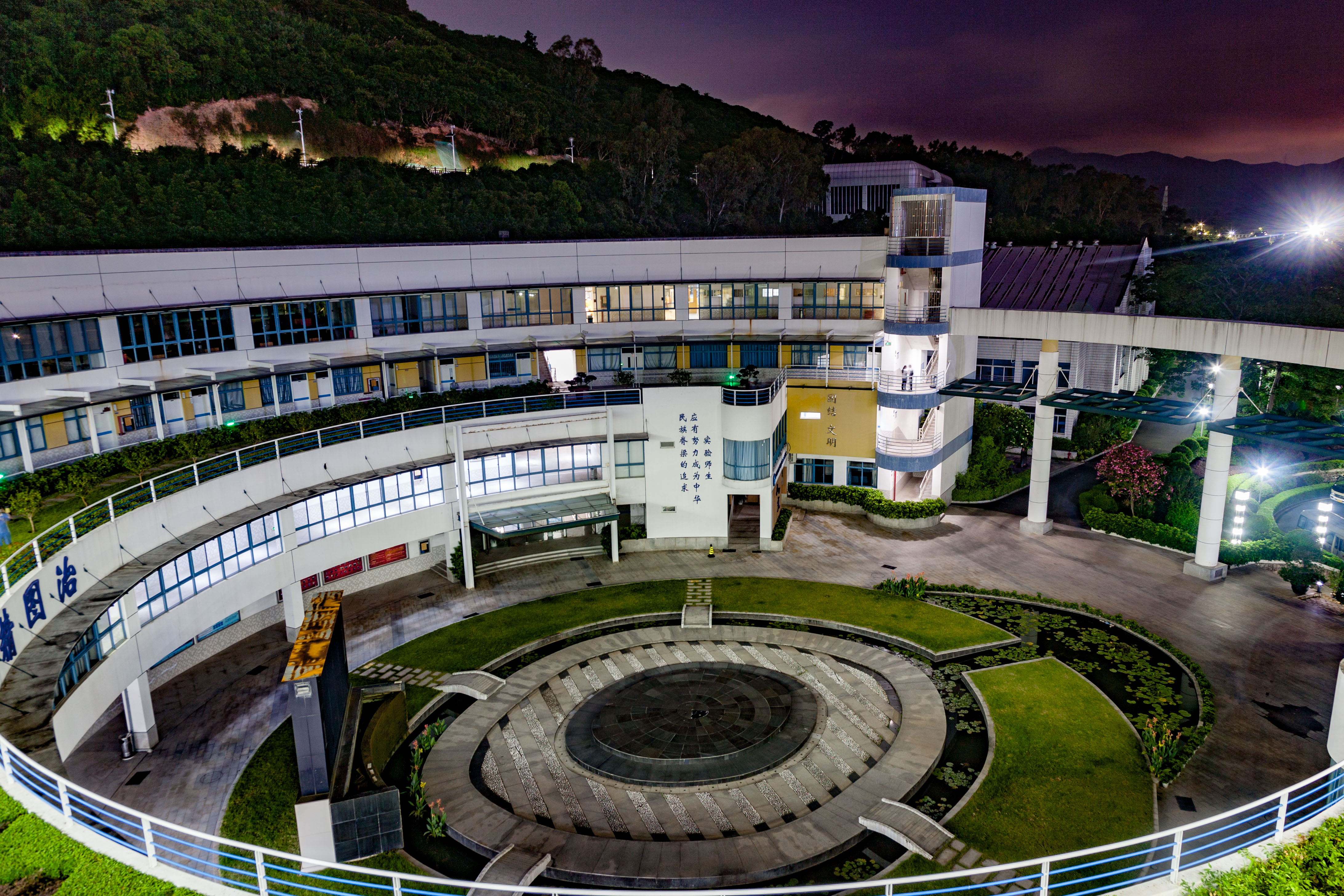 中文（中国大陆）: 深圳实验学校高中部综合楼夜景